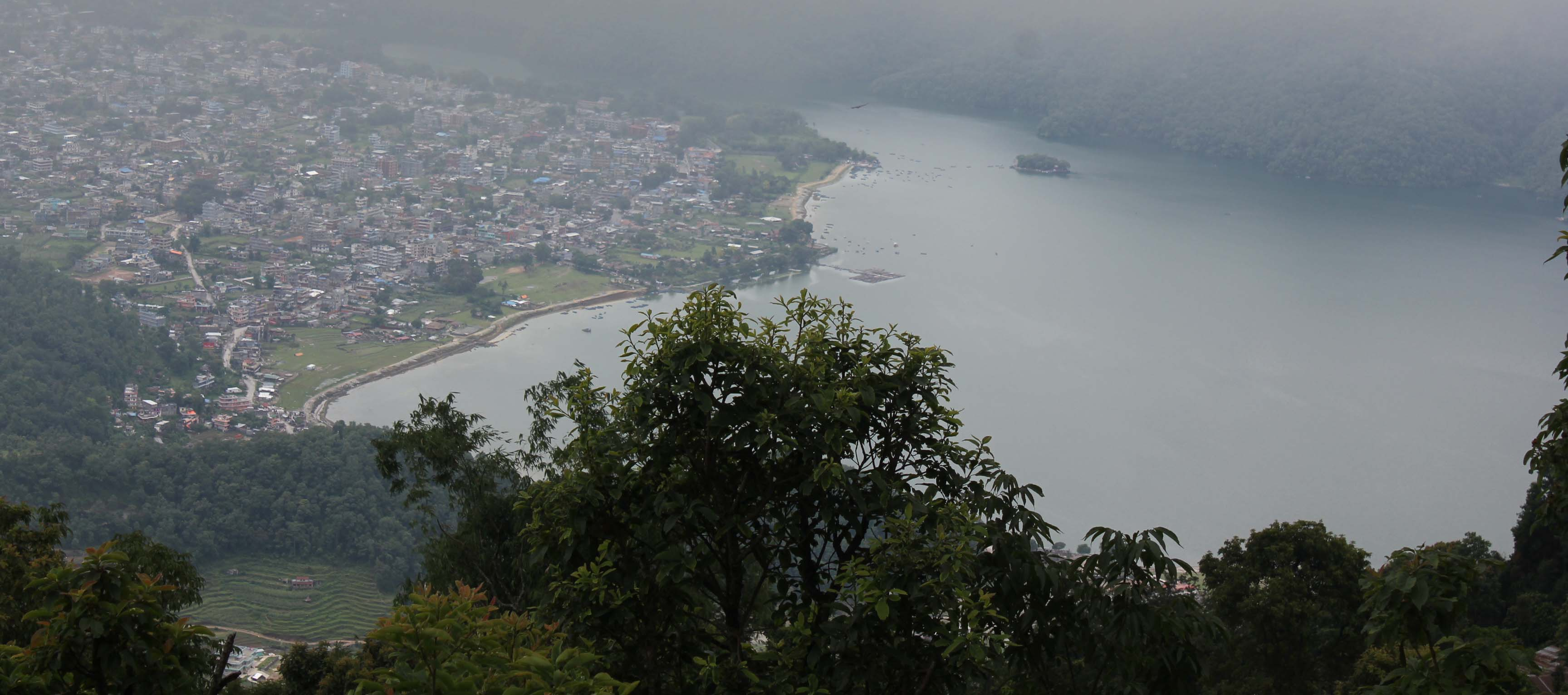 नेपाली: Sarangkot